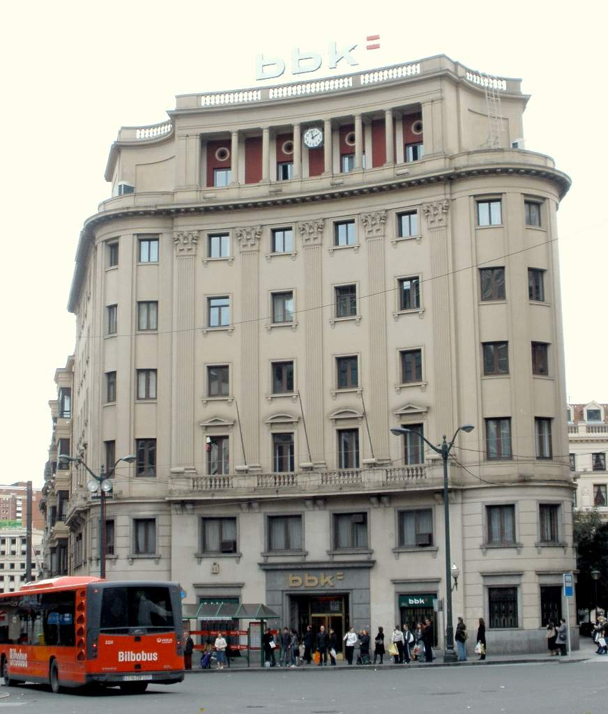 Edificio de la BBK, Plaza Circular, Bilbao